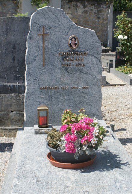 Grab Christian Pogats-Stadtfriedhof Eisenstadt.